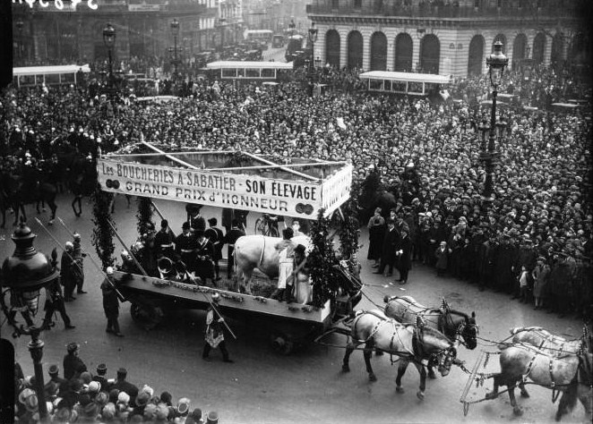 Le Char du Bœuf Gras passe place de l'Opéra à Paris le jour de la Mi-Carême 1928.